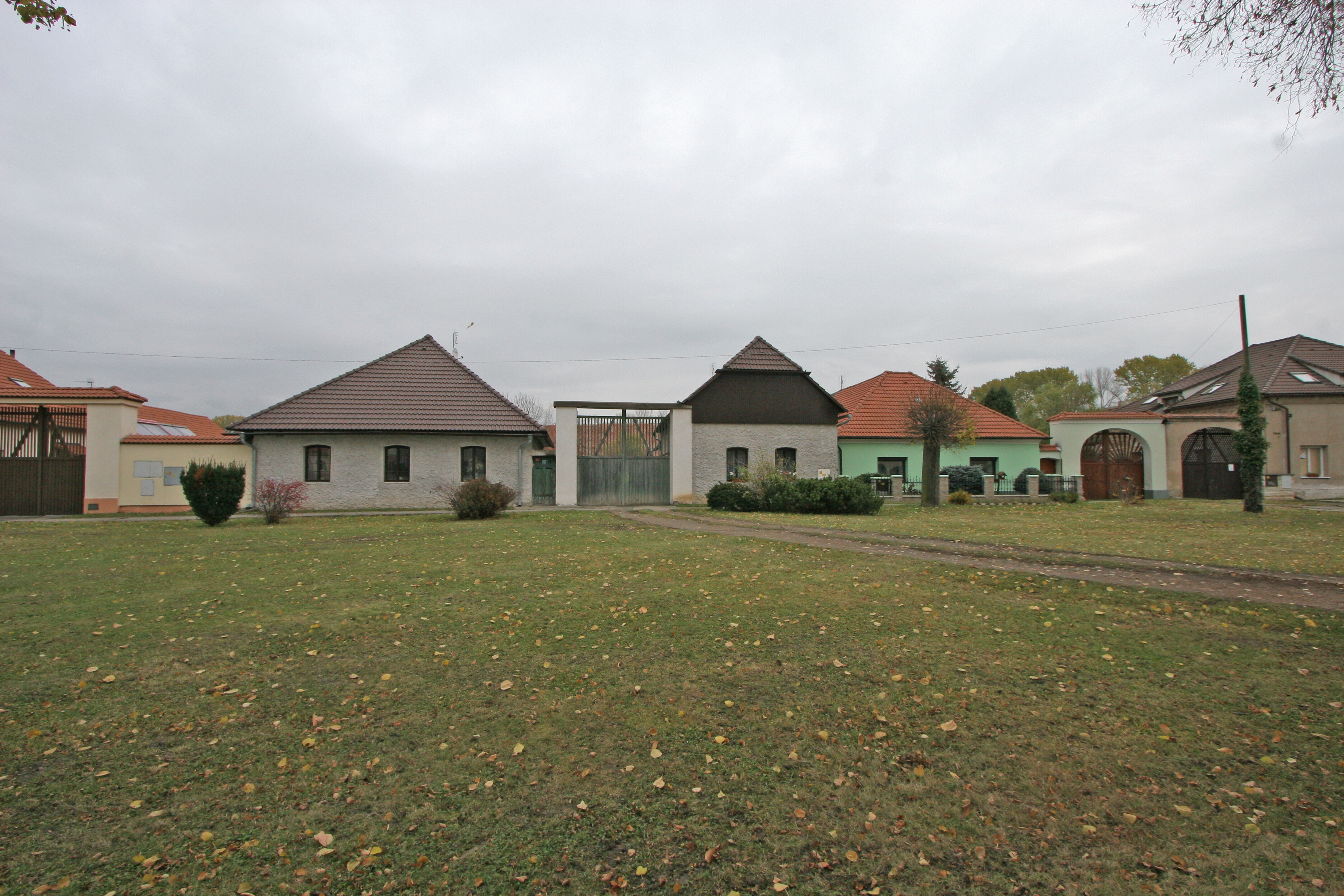 náves v Chotusicích